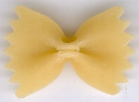 Quelle: selbst gescannt, 10/2004 Fotograf oder Zeichner: Späth Christian Lizenzstatus